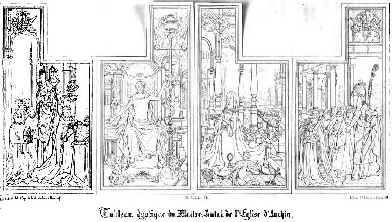 Abbaye d'Anchin - Tryptique autel